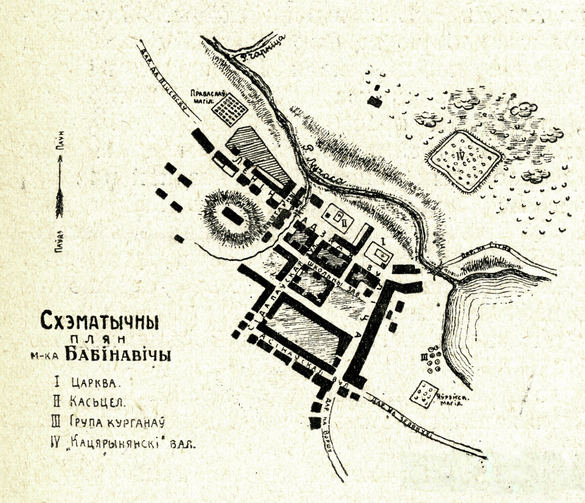 Беларуская (тарашкевіца): Бабінавічы (Babinavičy), плян мястэчка